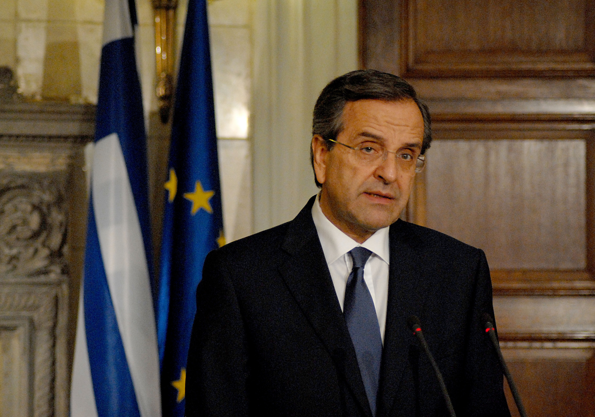 Αντώνης Σαμαράς - Angela Merkel - Επίσκεψη στην Αθήνα